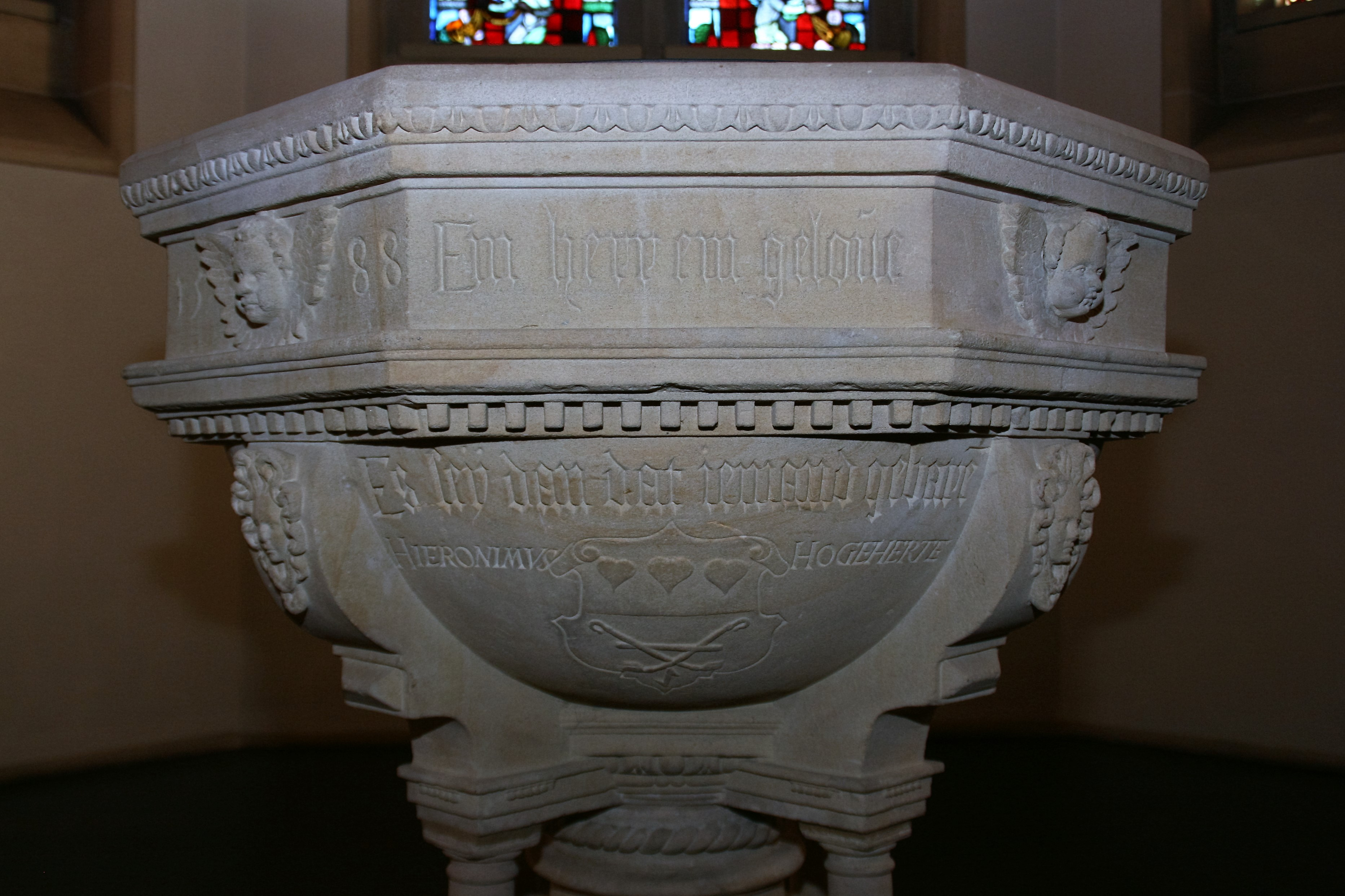 Inschrift des Sendenhorster Taufsteins 1, Standort: St. Laurentiuskirche, Westkirchen.